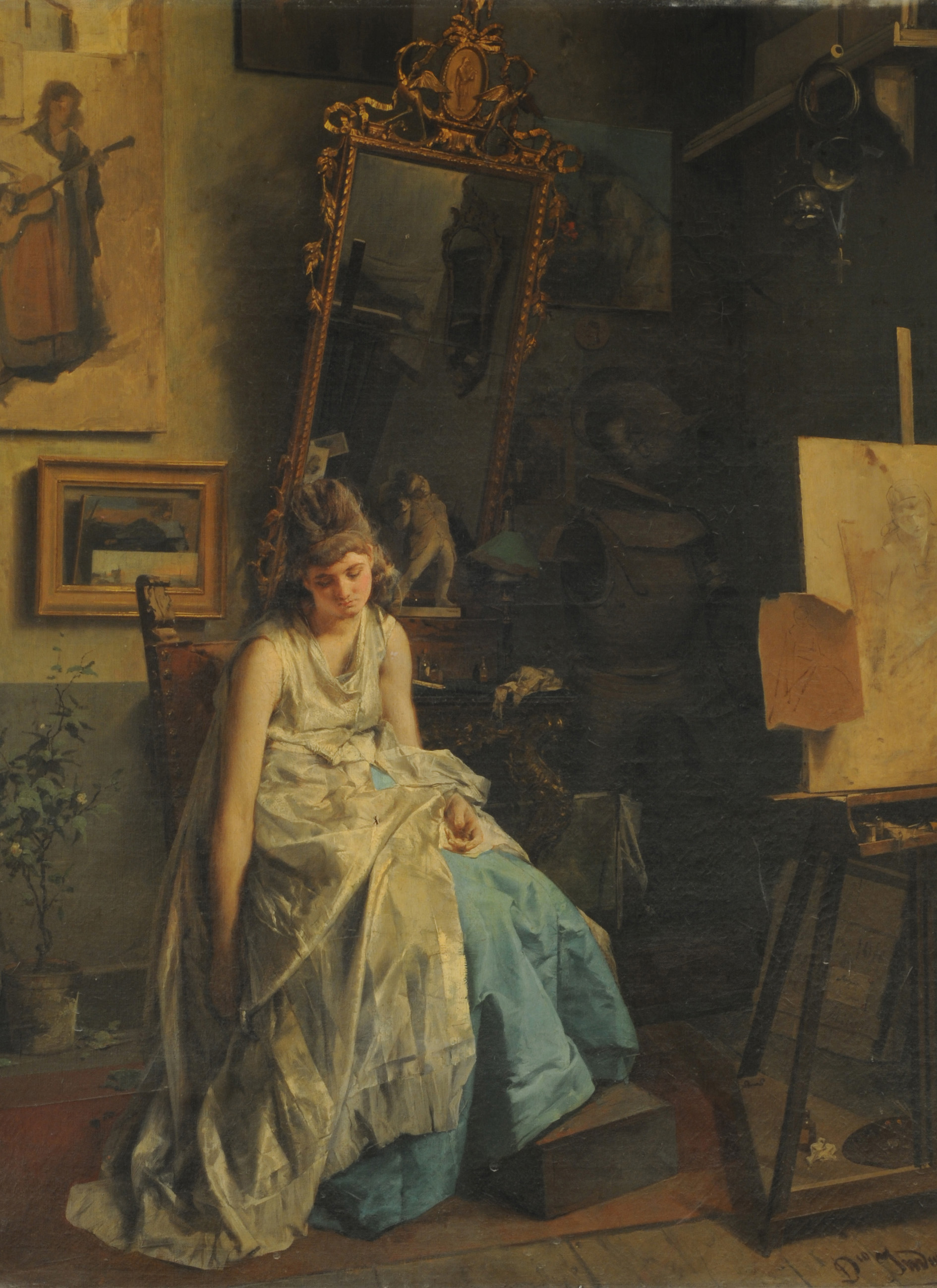 Domenico Induno, La modelo (Tít. ant.: Dans l'Atelier (en el atelier)). Ca. 1872. 85,5 x 64,5 cm, con marco: 114 x 93,5 x 10 x 16 cm, óleo sobre tela. Inv. 2168.